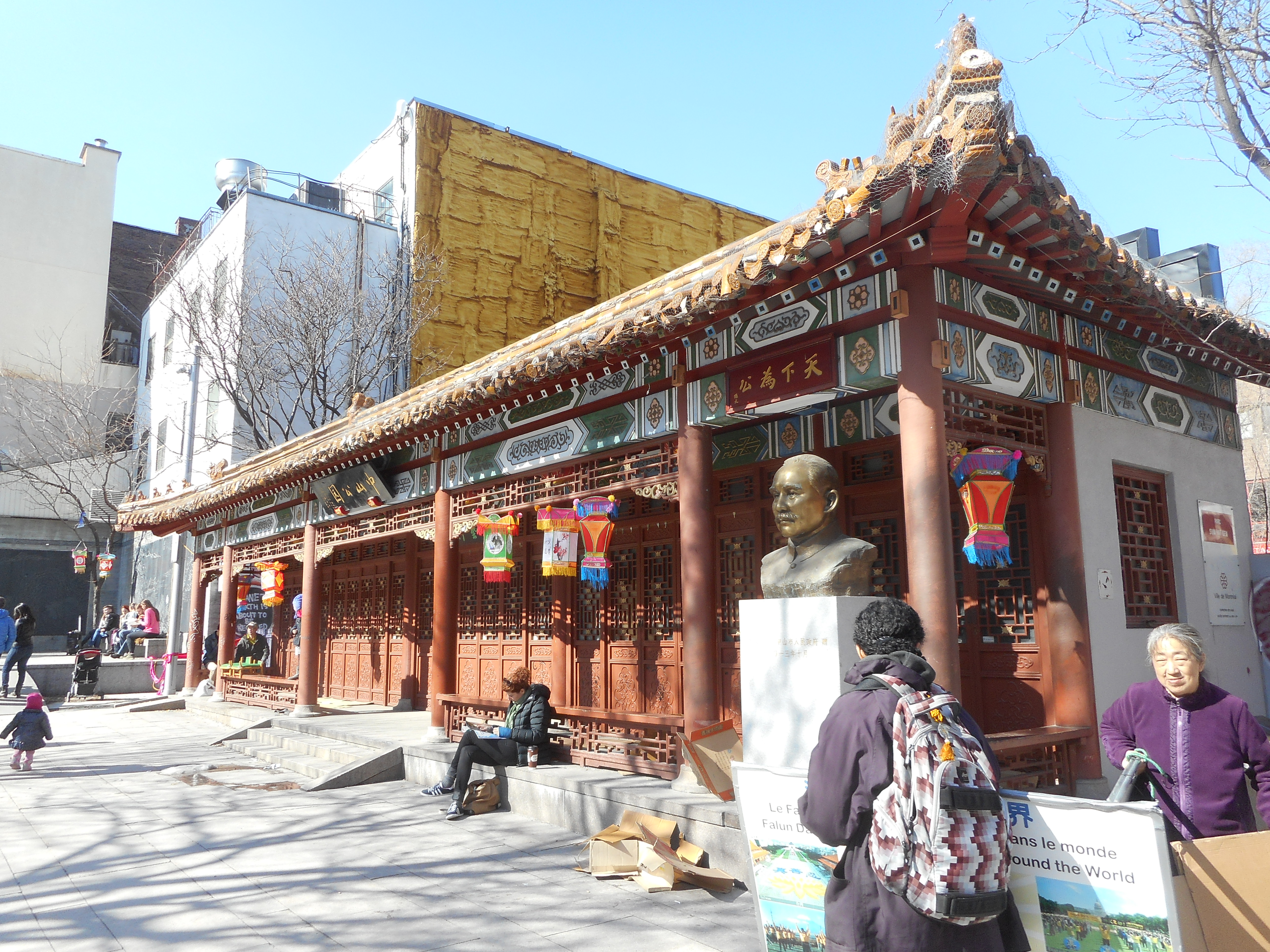 Place Sun Yat-Sen, à l'intersection des rues De La Gauchetière et Clark, quartier chinois de Montréal